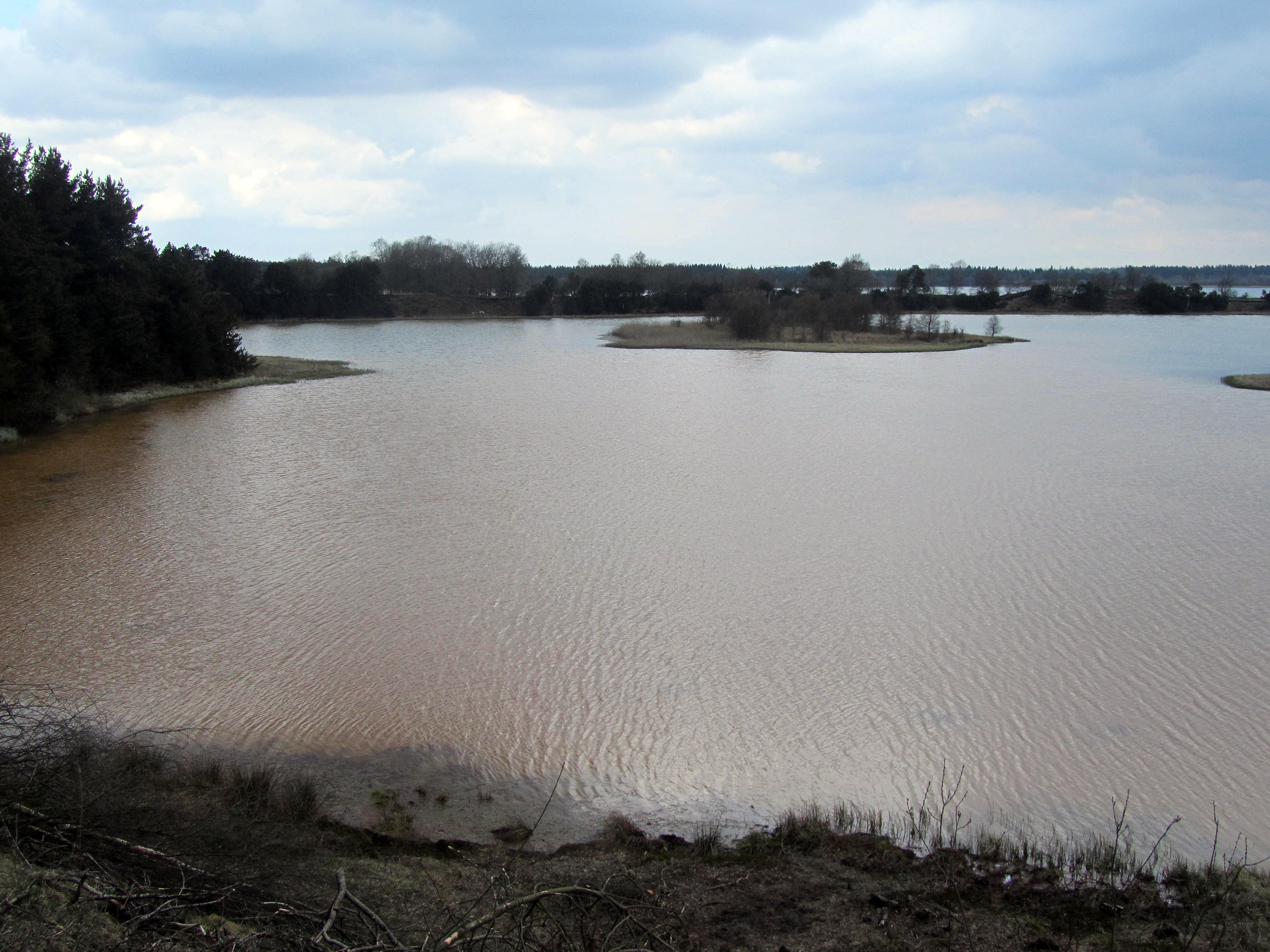 da: Brunkulssø ved Søby Brunkulslejer